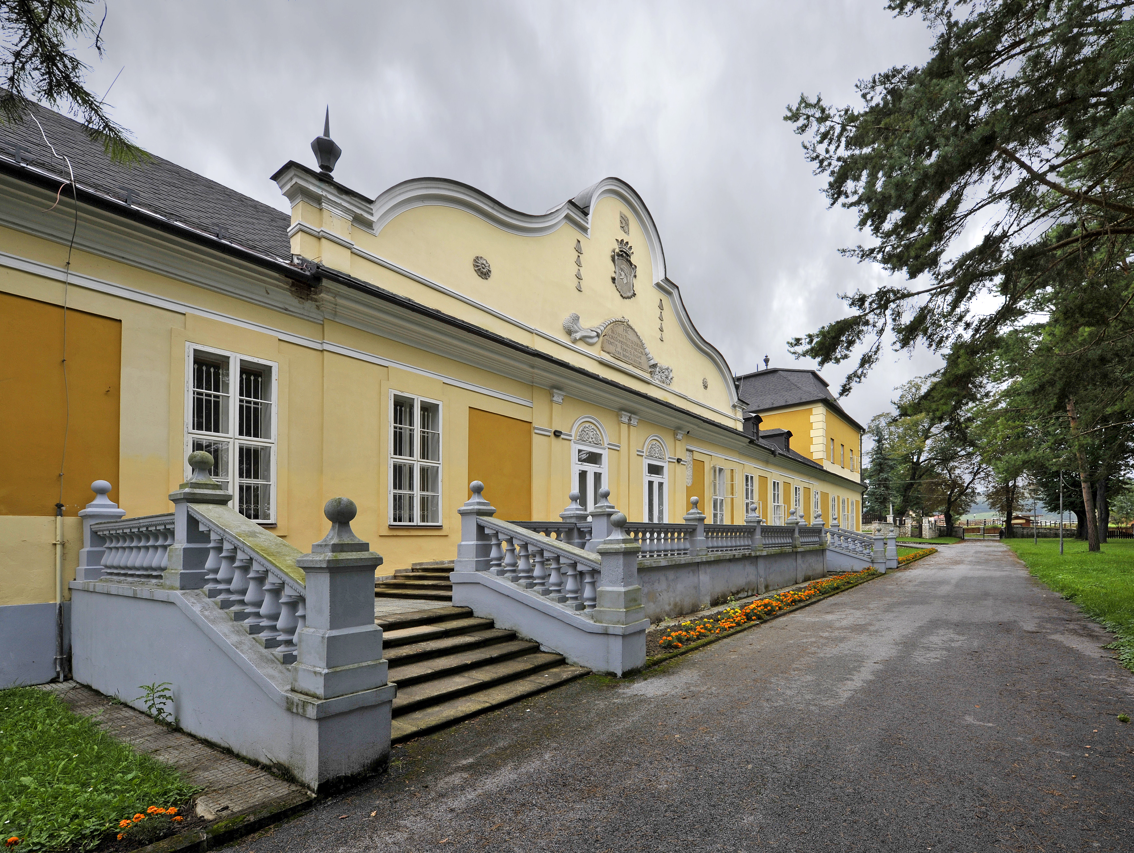 Kaštieľ